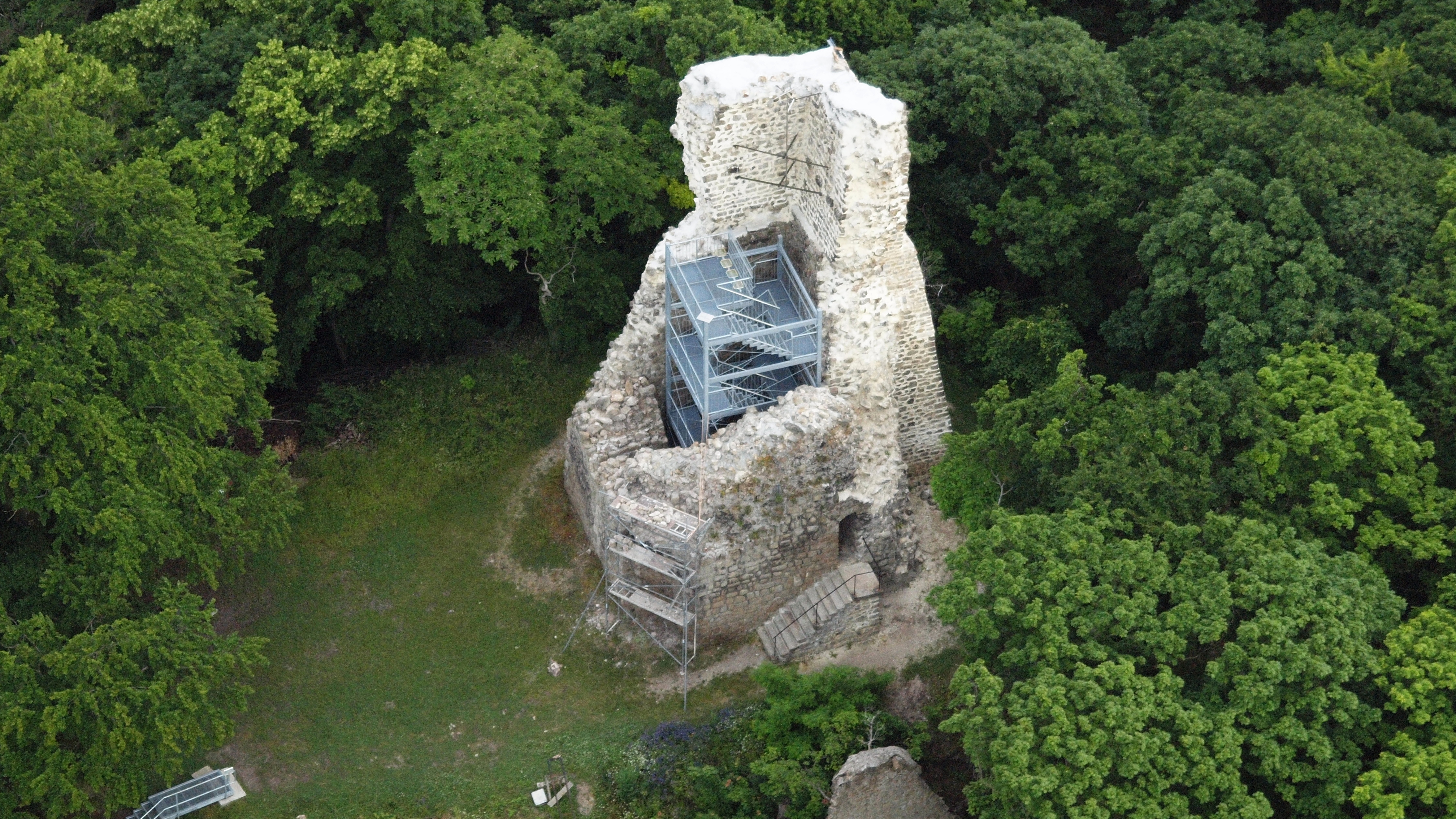 Burg Lauenburg, Luftaufnahme (2015)